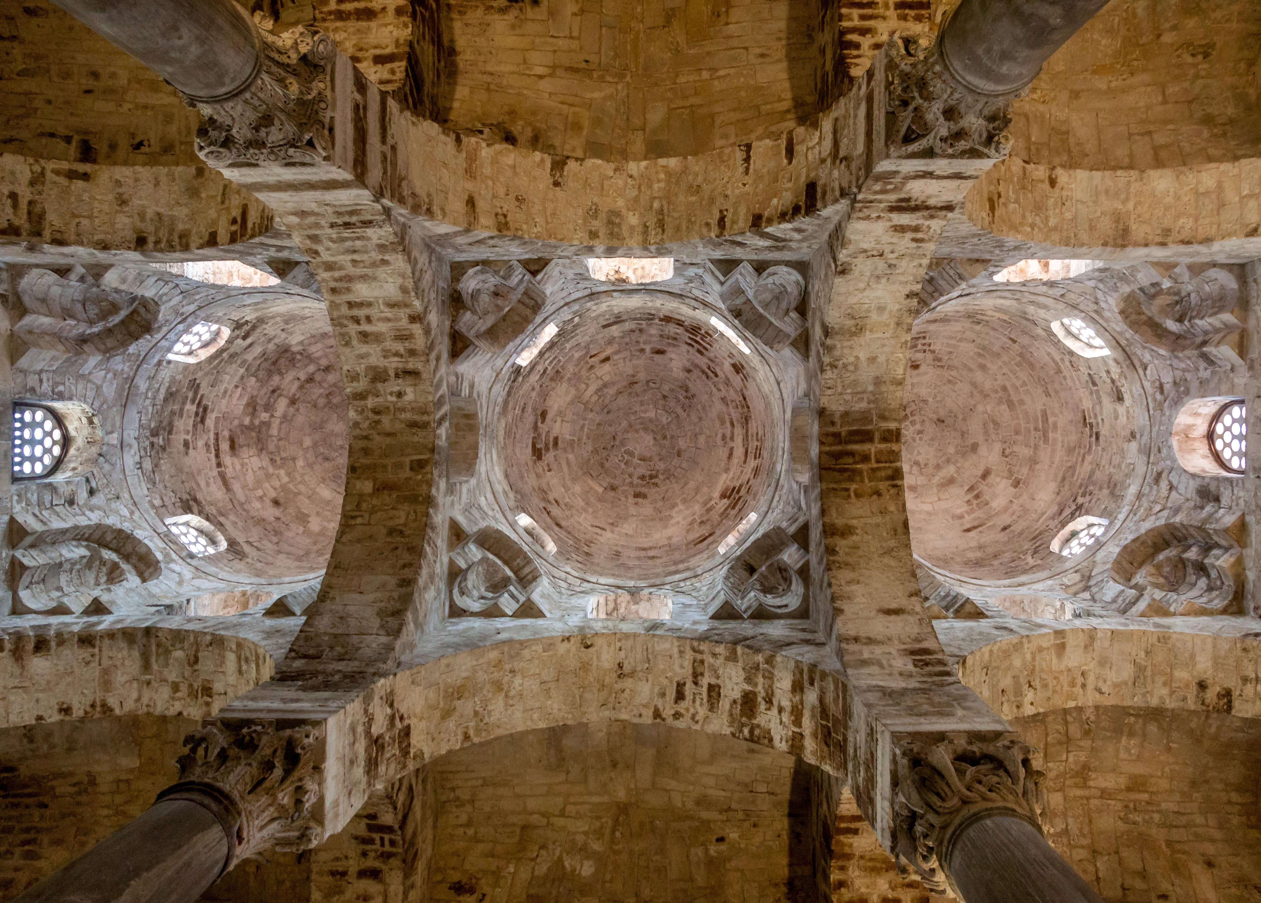 San Cataldo (Palermo) - Kuppel